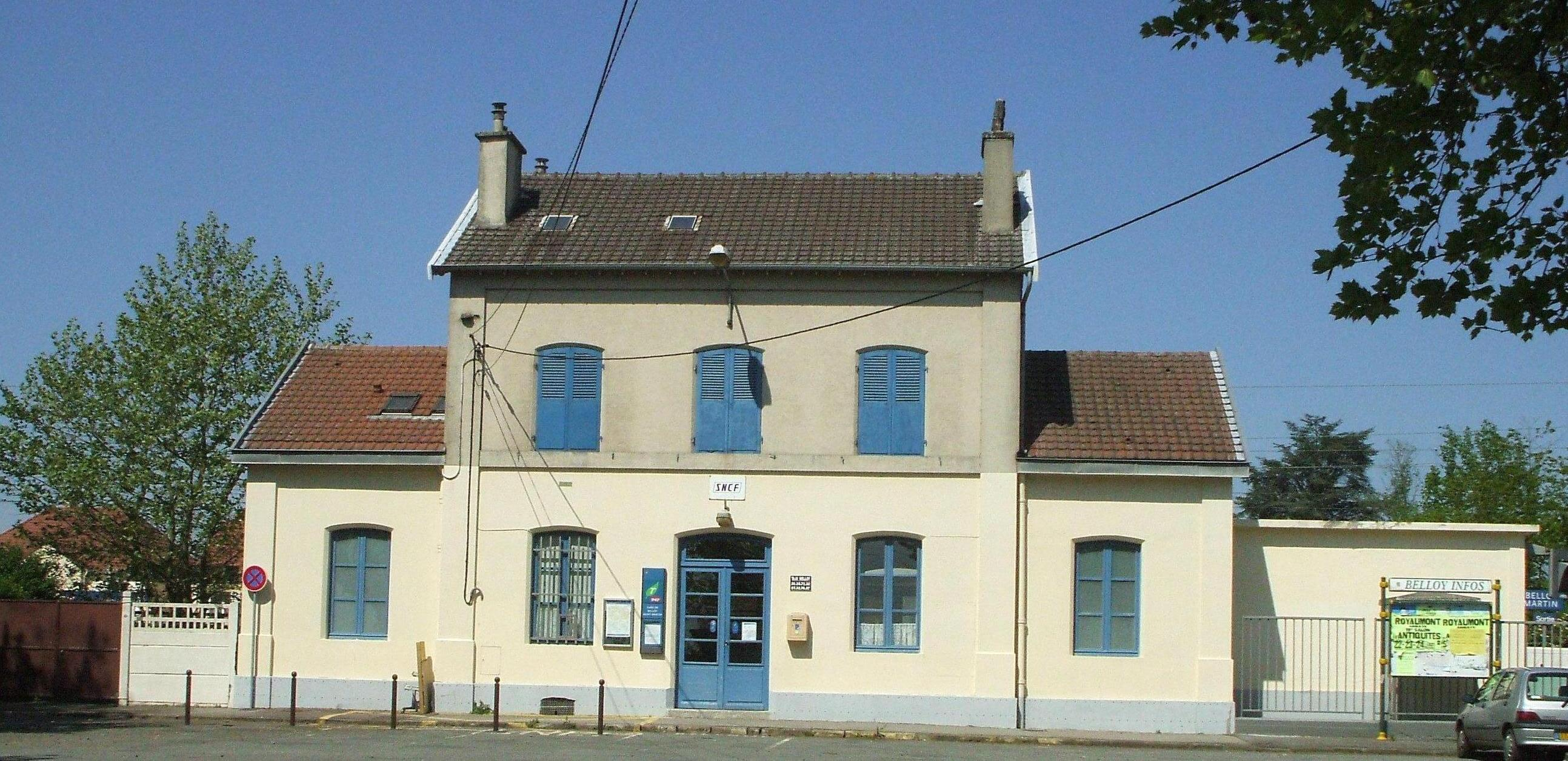 gare de chemin de fer de belloy en france val d'oise